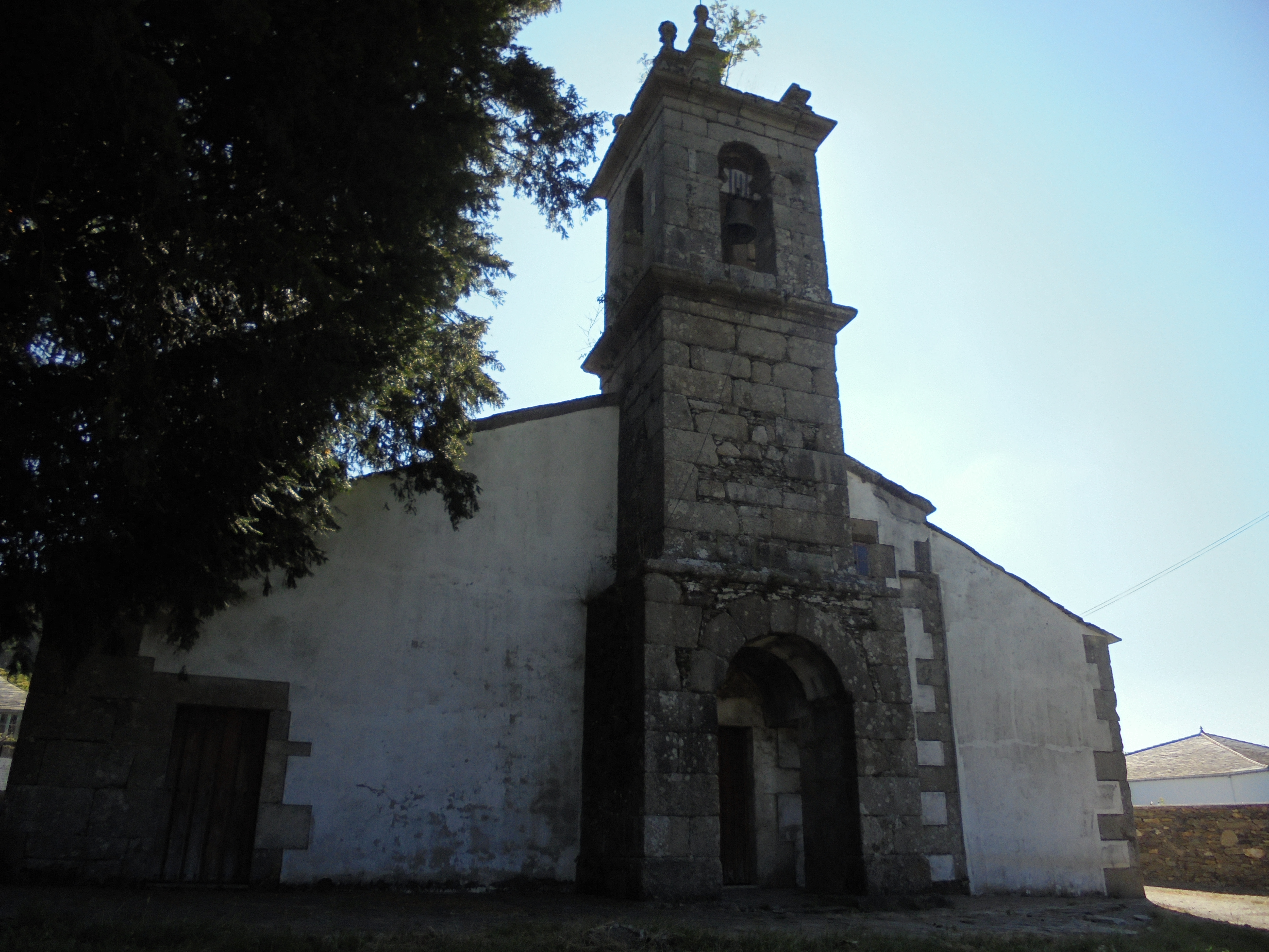 Fachada da igrexa da Esperela ( Baleira)